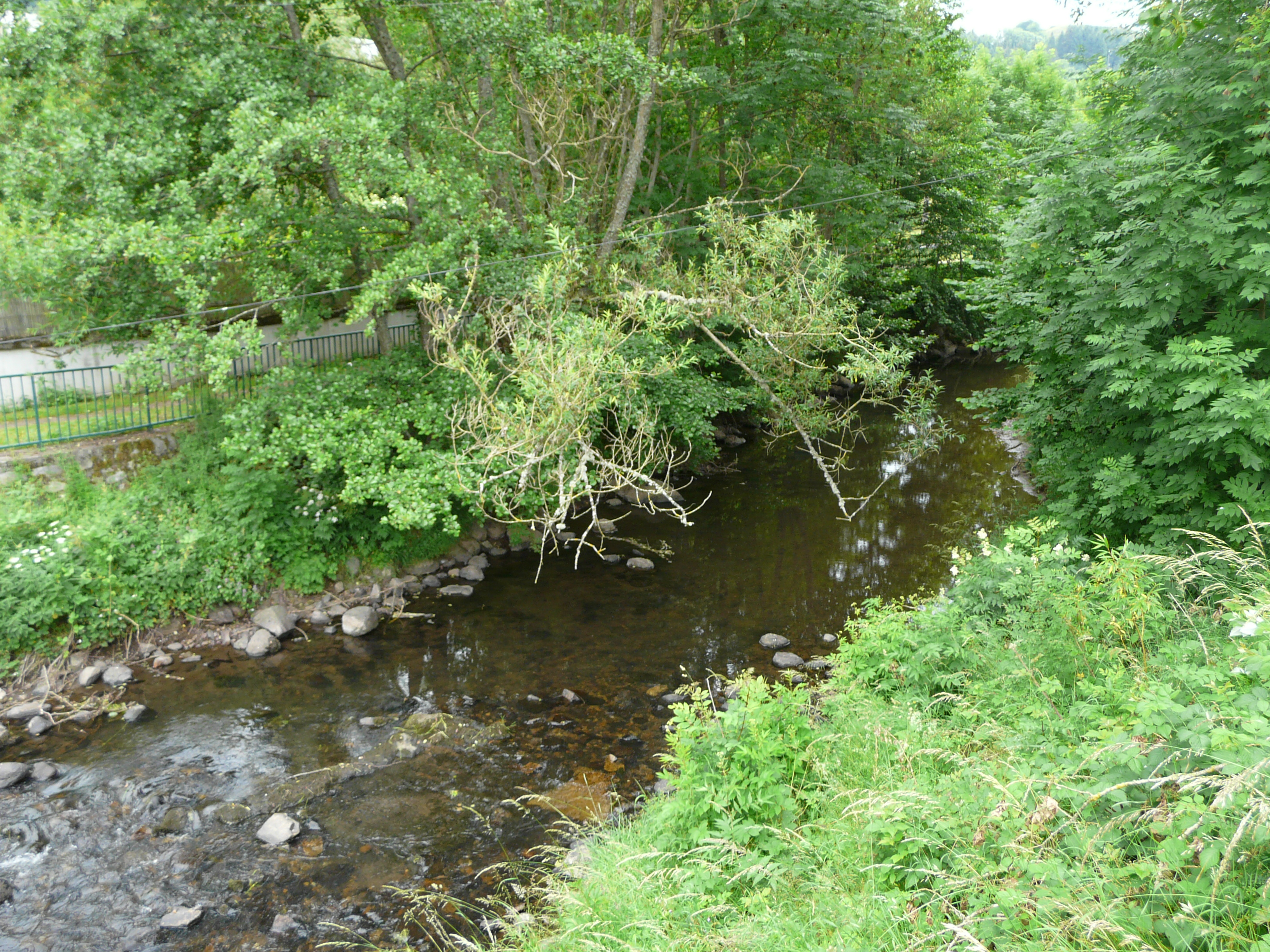 La Véronne en amont de la route départementale 3, Riom-ès-Montagnes, Cantal, France.